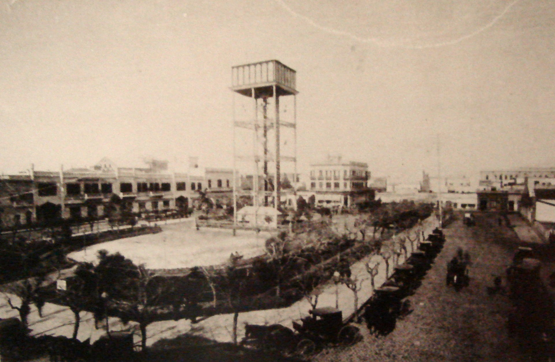 Tanque de Agua en medio de la Plaza Lorea, antes de su demolición en 1910. A la izquierda se destaca el Mercado Modelo, demolido en 1889 por la apertura de la Avenida de Mayo. Vista desde Paraná y Rivadavia mirando hacia el sur. Buenos Aires, Argentina.